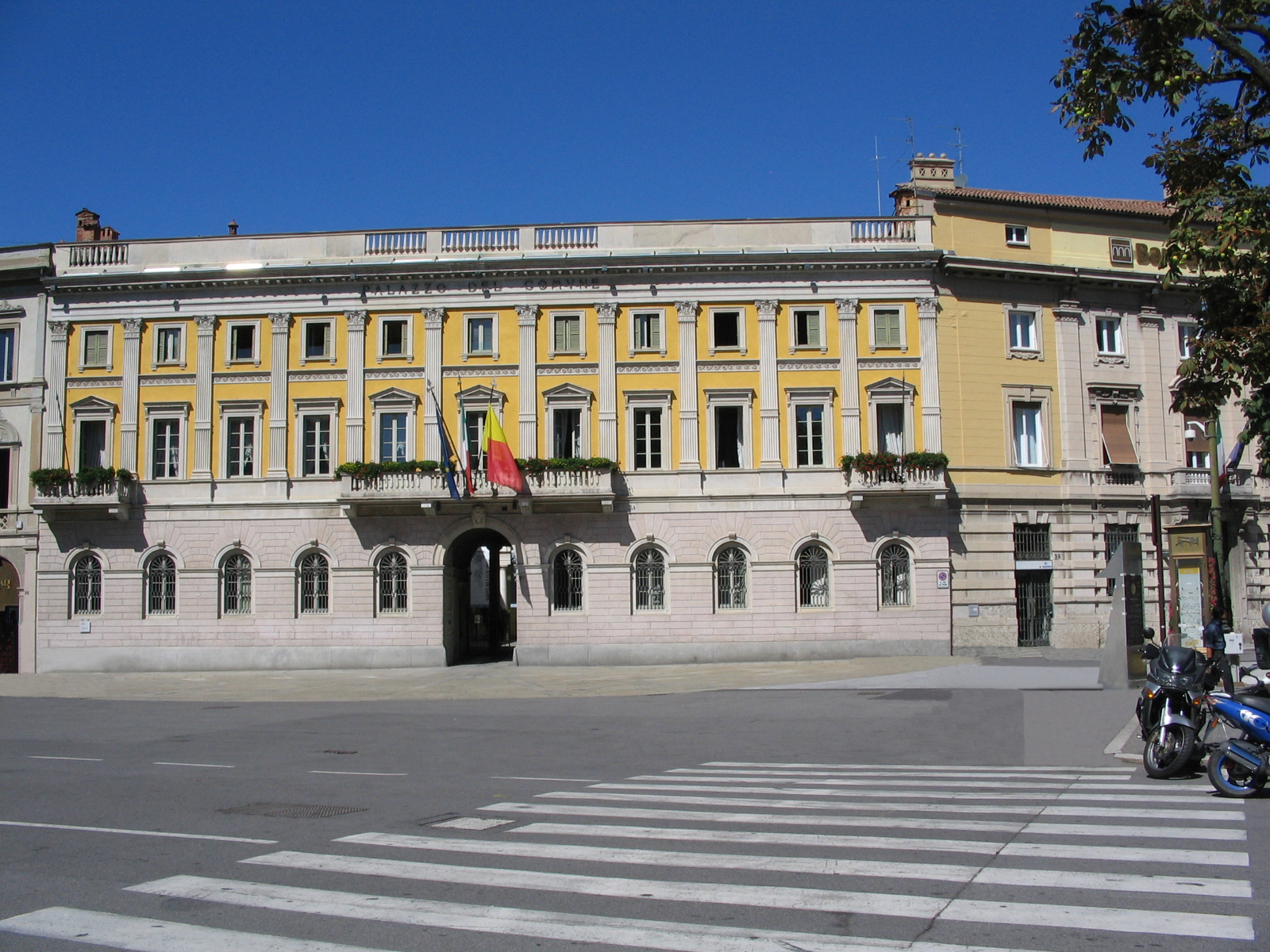 Autore Giorces. Bergamo, il Municipio (palazzo Frizzoni)